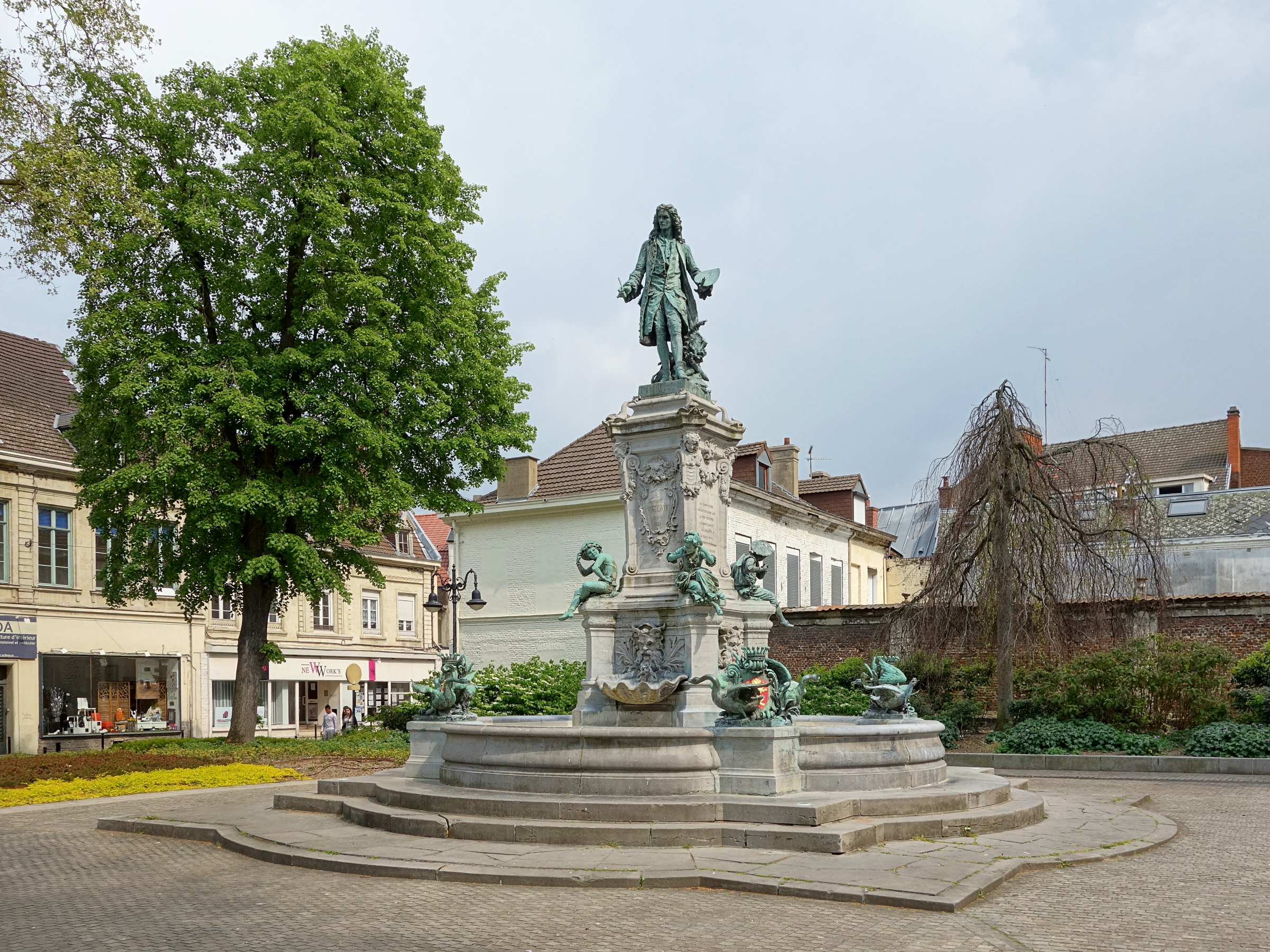 Monument à Antoine Watteau à Valenciennes.